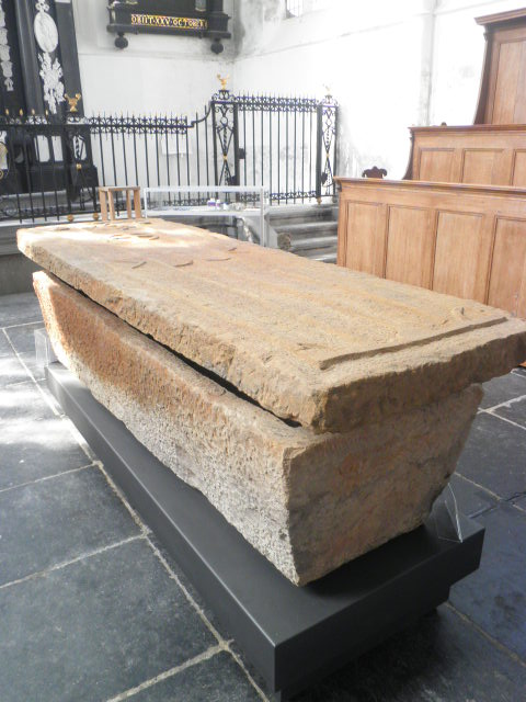 Sarcofaag, tussen 2006 en 2008 uit het Markermeer bij Etersheim gehaald. Deksel bestond uit twee delen, verer compleet.